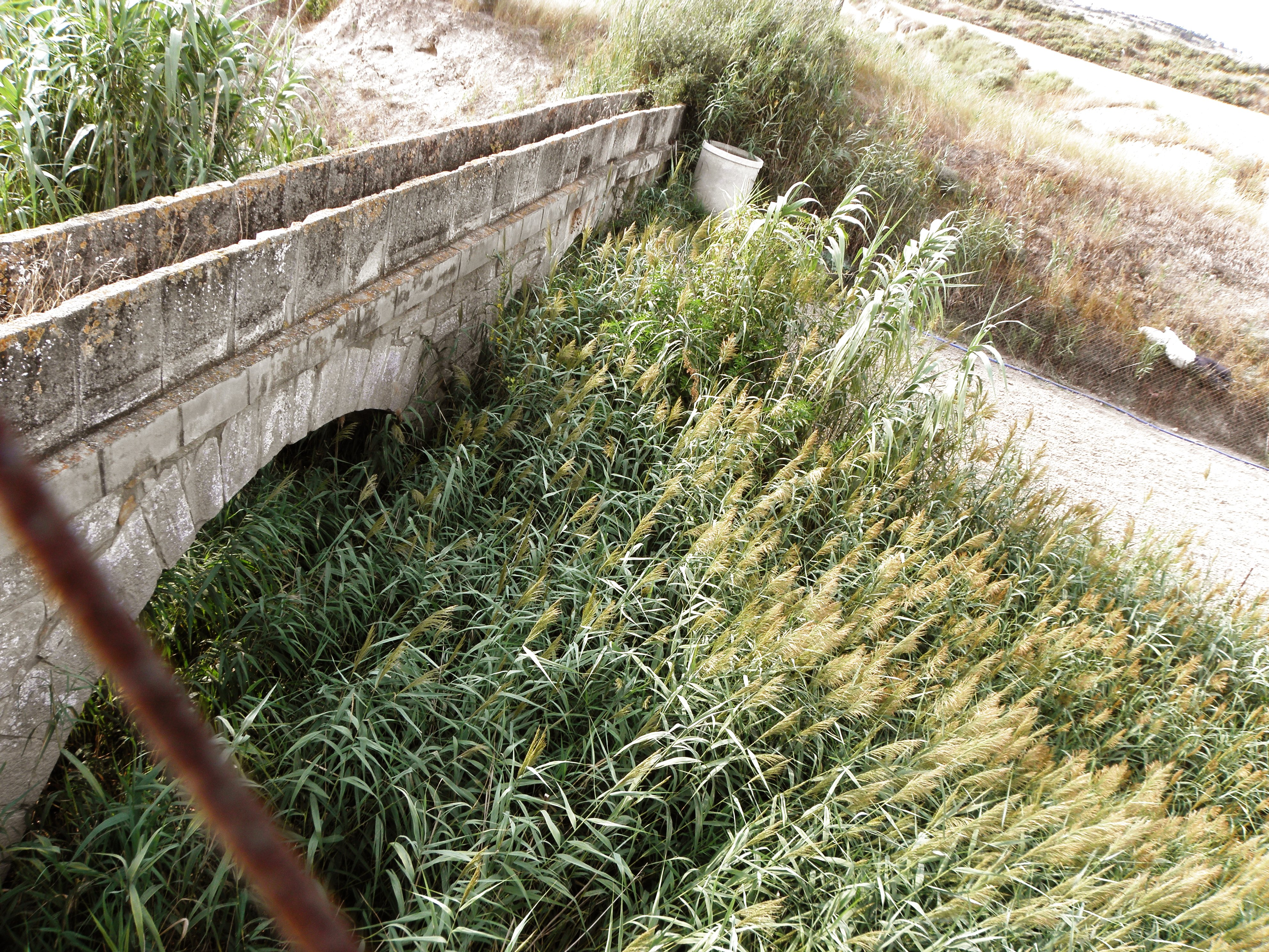 Enfesta (La Molsosa, Solsonès). El pontet (aqüeducte?) a l'entrada del poble.